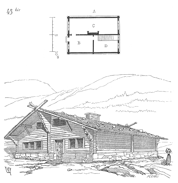 ... En nous rapprochant des bords du Rhin, dans les provinces de l'Est, dans les montagnes des Vosges, près des petits lacs de Gérardmer et de Retournemer, on voit encore des habitations de paysans qui présentent tous les caractères de la construction de bois par empilage. Basses, larges, bien faites pour résister aux ouragans et pour supporter les neiges, elles ont un aspect robuste. Presque toujours ces maisons se composent de trois pièces à rez-de-chaussée et de quatre pièces sous comble (43 bis). Le plan A d'une de ces maisons, prise au niveau du rez-de-chaussée, présente en B la salle d'entrée, de laquelle on passe ou dans la grande salle C, ou dans l'arrière-pièce D qui possède l'unique escalier montant au premier étage sous comble. C'est dans la salle C, éclairée par les deux bouts, que se réunit toute la maisonnée pour les repas et la veillée. C'est aussi dans cette pièce que se préparent les aliments. Une grande cheminée avec pieds-droits, contre-cœur, manteau et tuyau en maçonnerie, traverse la toiture. C'est la seule partie du bâtiment qui, avec les socles, ne soit pas en bois. La couverture est faite ou en tuiles, ou en grès schisteux, ou en lames minces de grès; de plus elle est chargée de pierres. Les maisons s'élèvent sur un soubassement de 1m,00 de hauteur environ, formé de gros blocs de grès. Un pan de bois composé de troncs d'arbres assez grossièrement équarris sépare la masure dans sa longueur par le milieu, et supporte l'extrémité supérieure des chevrons ...